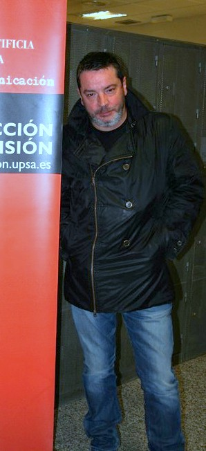 Enrique Urbizu en el máster de guión de la UPSA